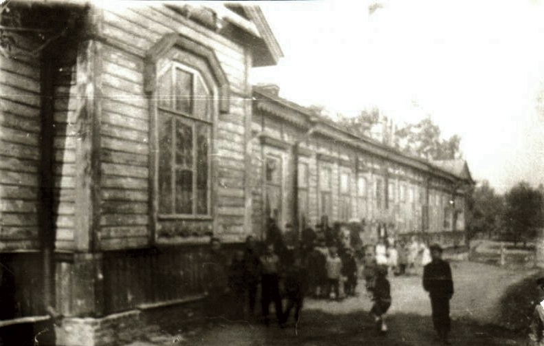 Школа 1 ступени в посёлке Бирюлёво.